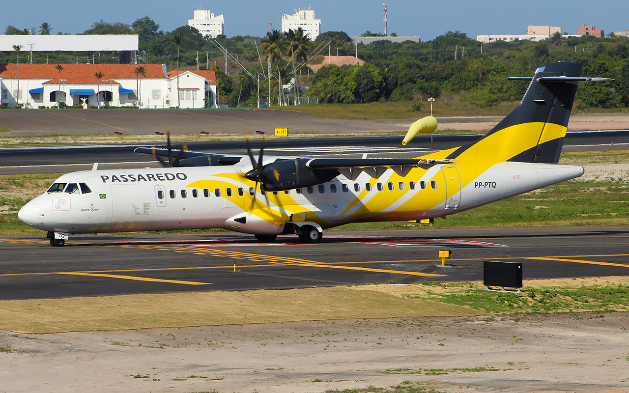 ATR 72-500 (72-212A) (Passaredo Linhas Aéreas)